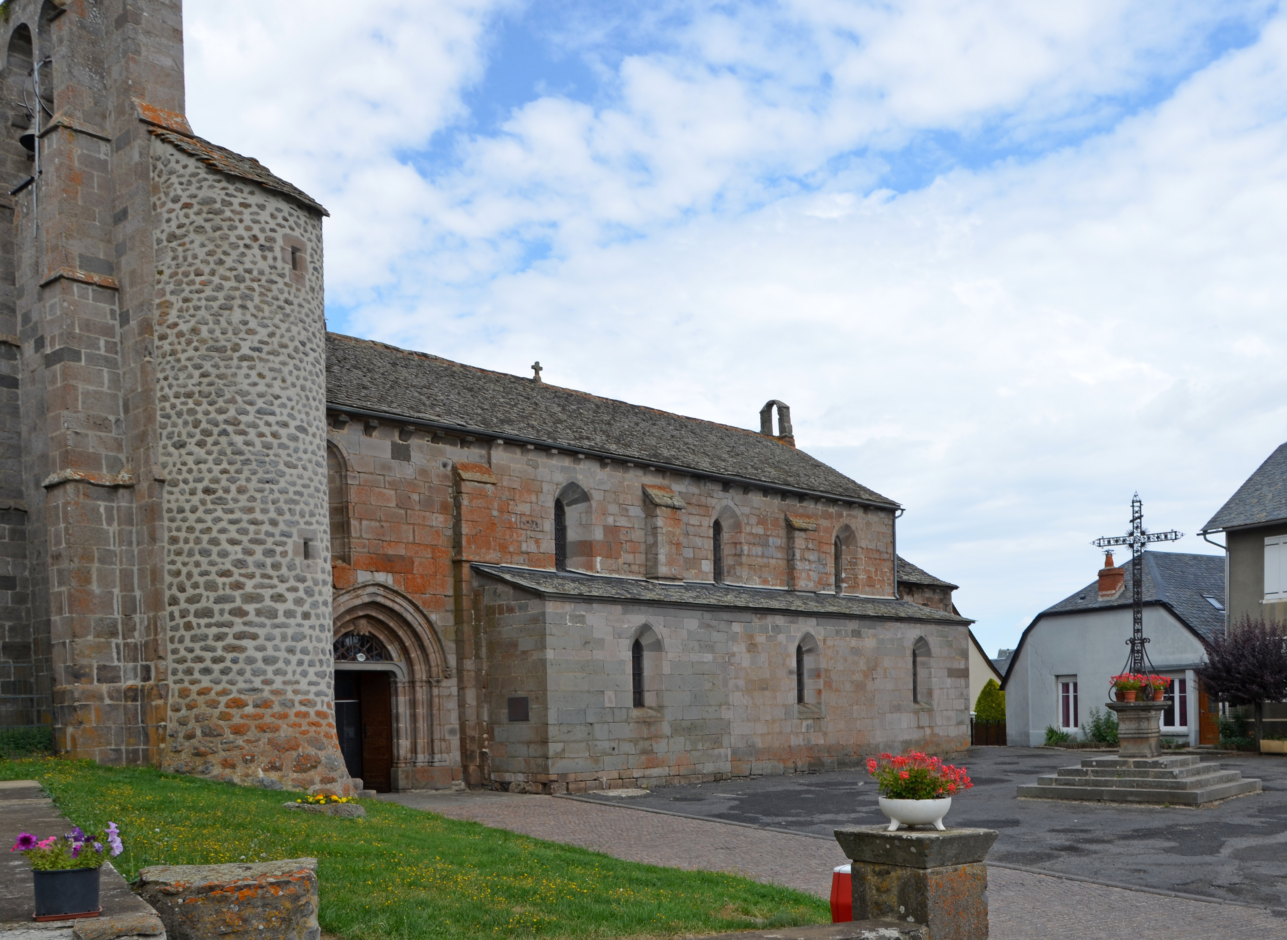 Eglise St Saturnin, Valuéjols, Cantal, France .